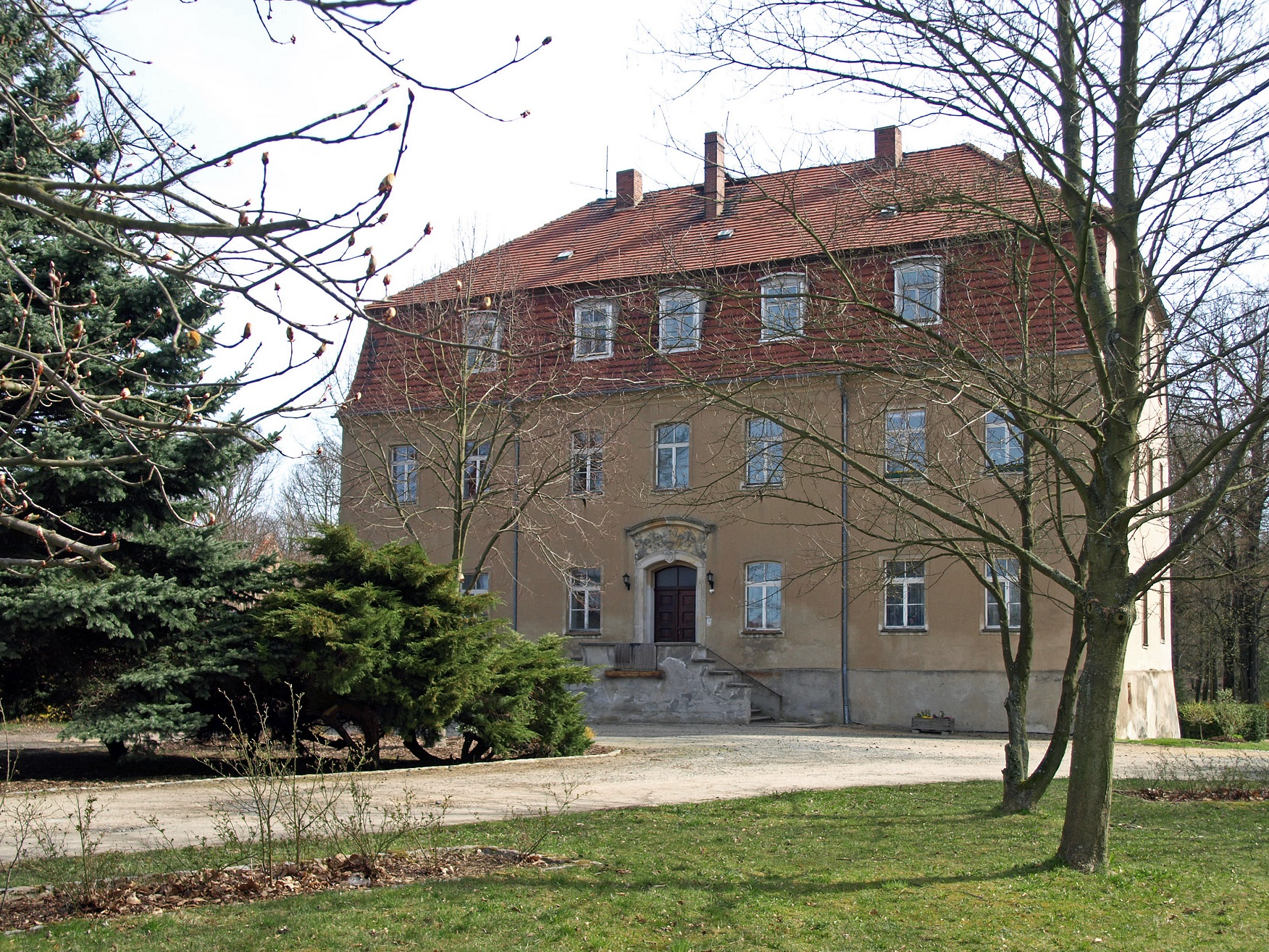 Herrenhaus Deutsch Paulsdorf